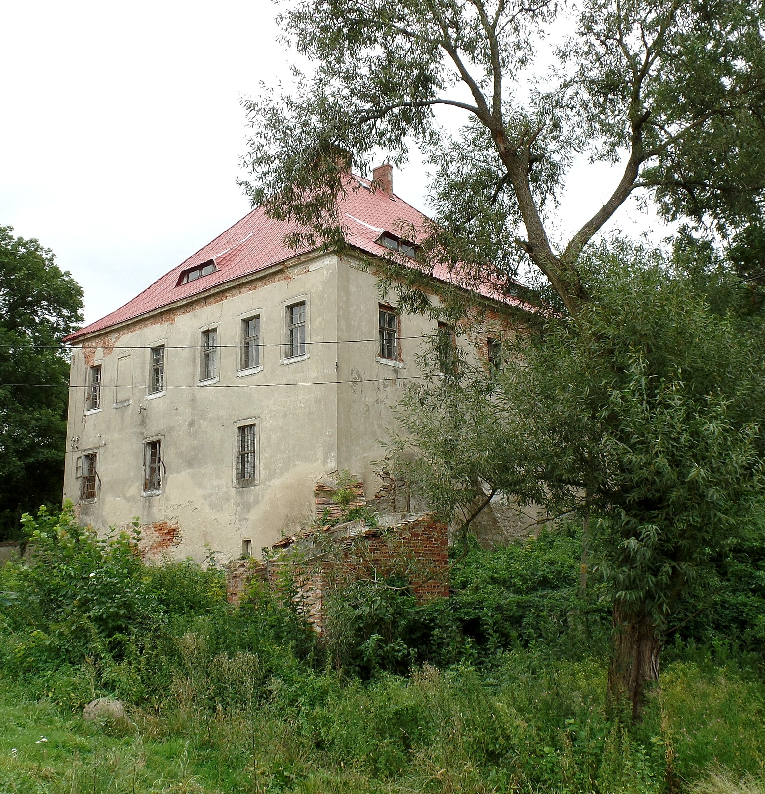 Pałac w Ulanowicach